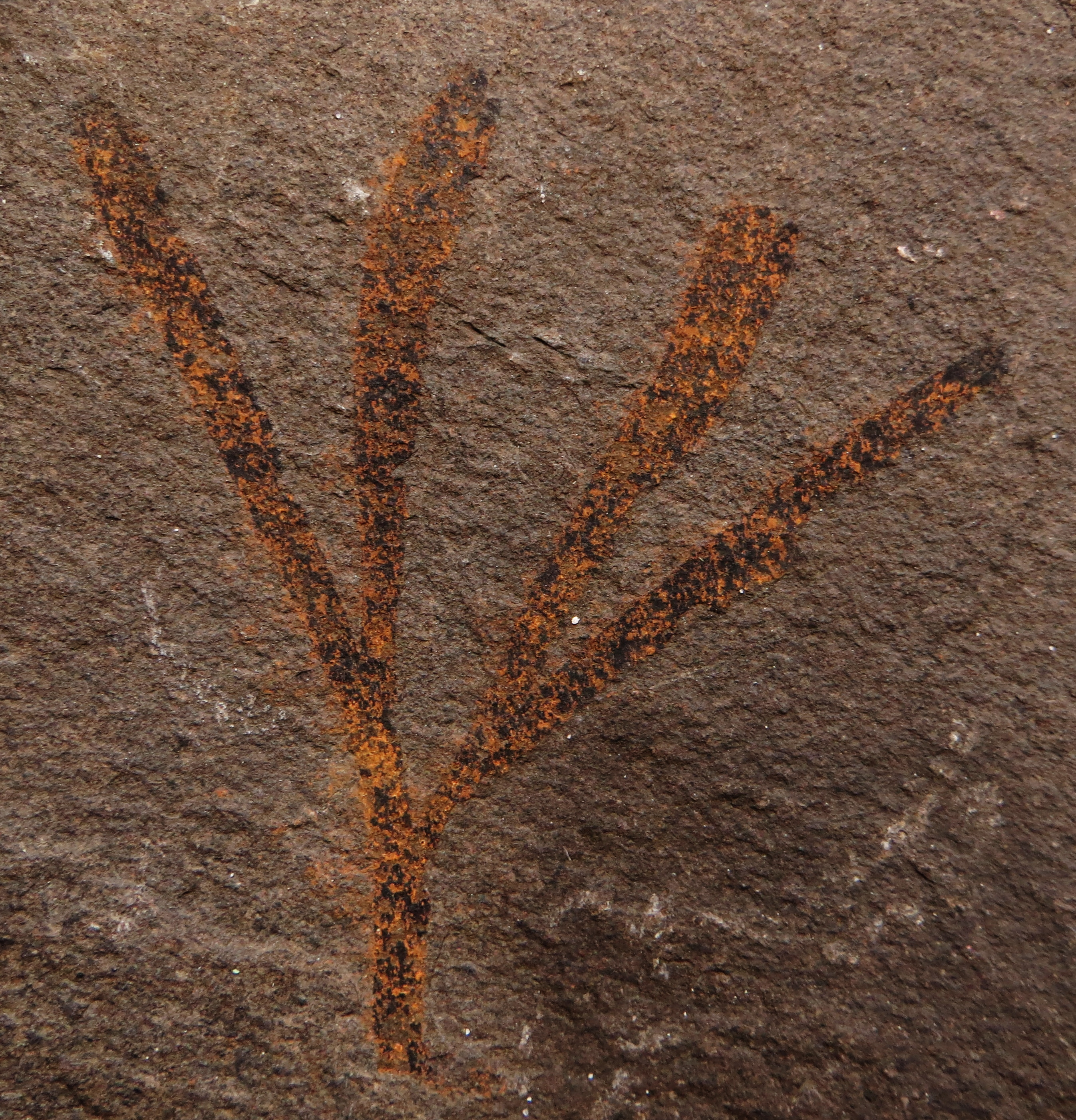 Fossil of plant - Took the picture at Natural History Museum, Bonn University